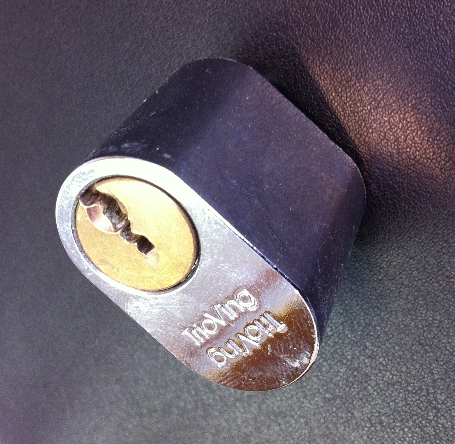 Standard oval sylinderlås